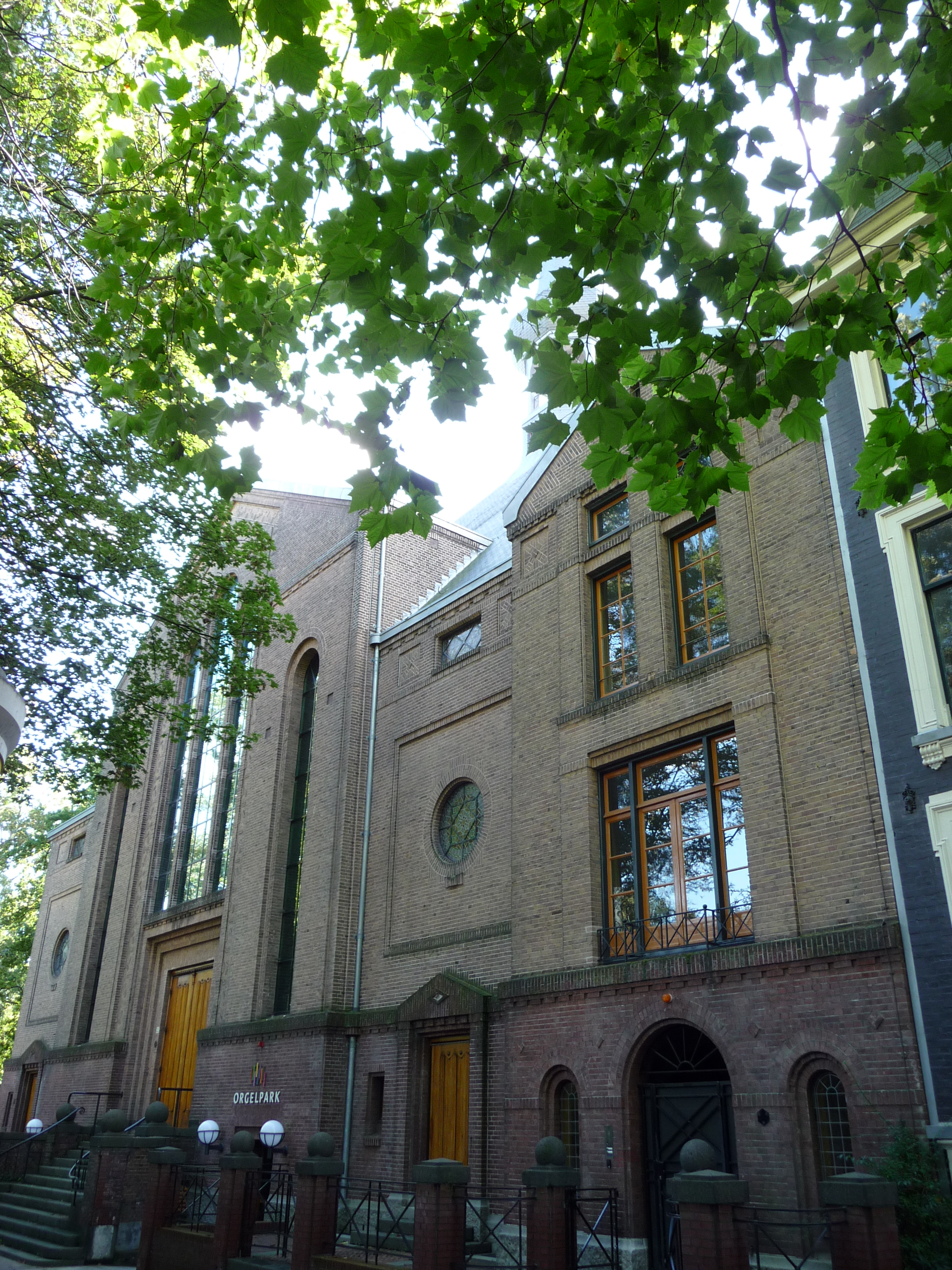 Rijksmonument Gerard Brandtstraat 26, Amsterdam